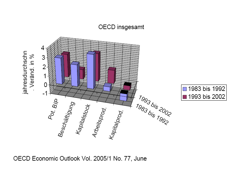 OECD-Wirtschaftsdaten grafisch dargestellt, OECD, Economic Outlook, No. 77, June 2005